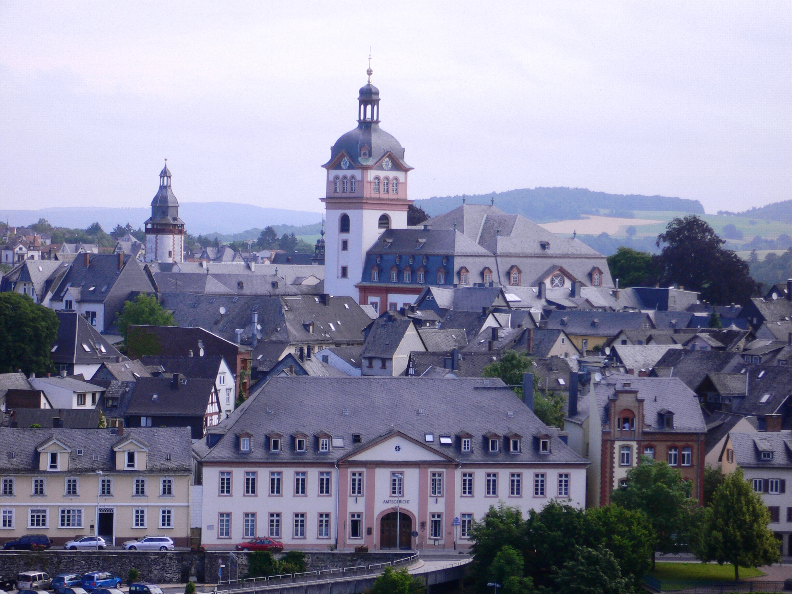 Die Weilburger Altstadt von Südwesten (mit Amtsgericht und Schloss)